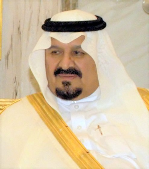 Prince Sultan bin Abdulaziz